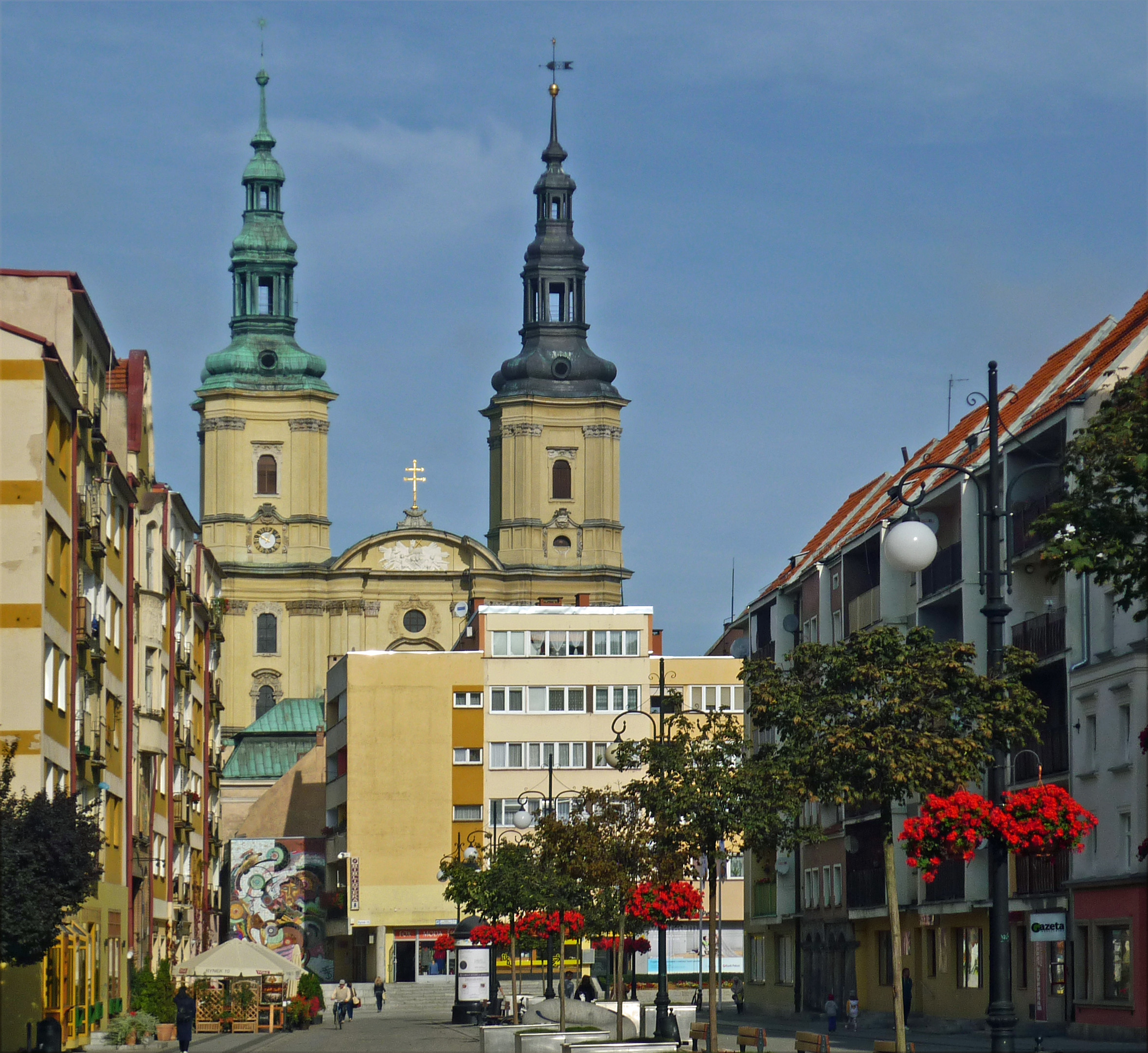 Pfarrkirche St. Johannes der Täufer in Liegnitz/Legnica